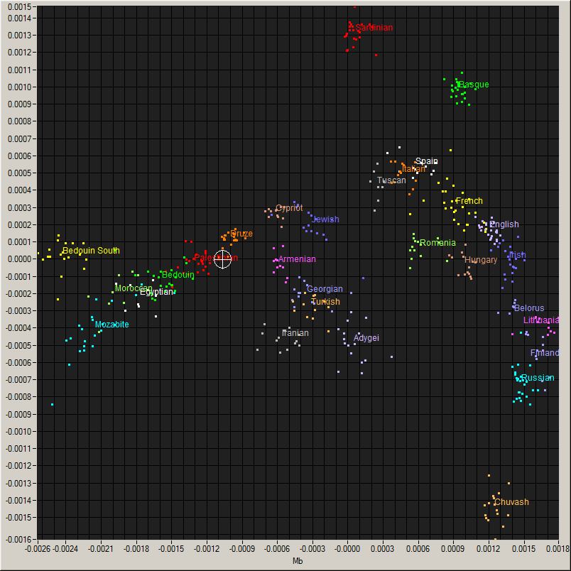 Moroccan Arab